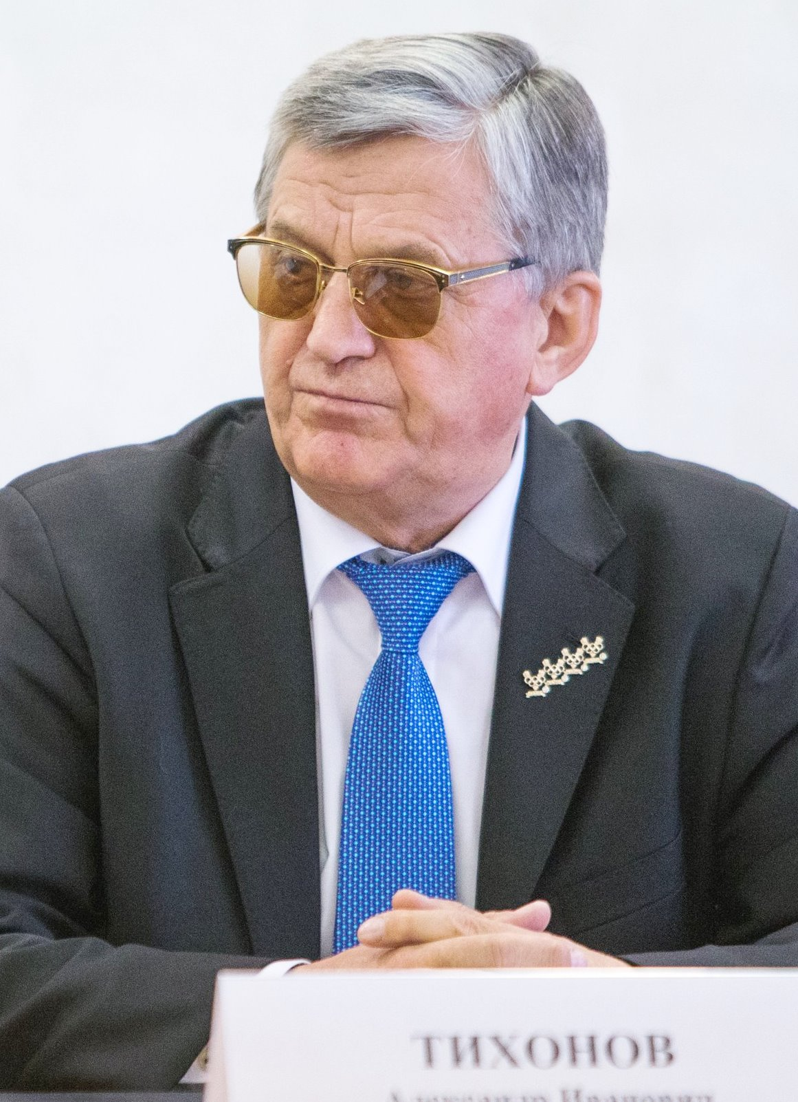 Александр Иванович Тихонов (род. 1947) — советский биатлонист. Четырёхкратный олимпийский чемпион